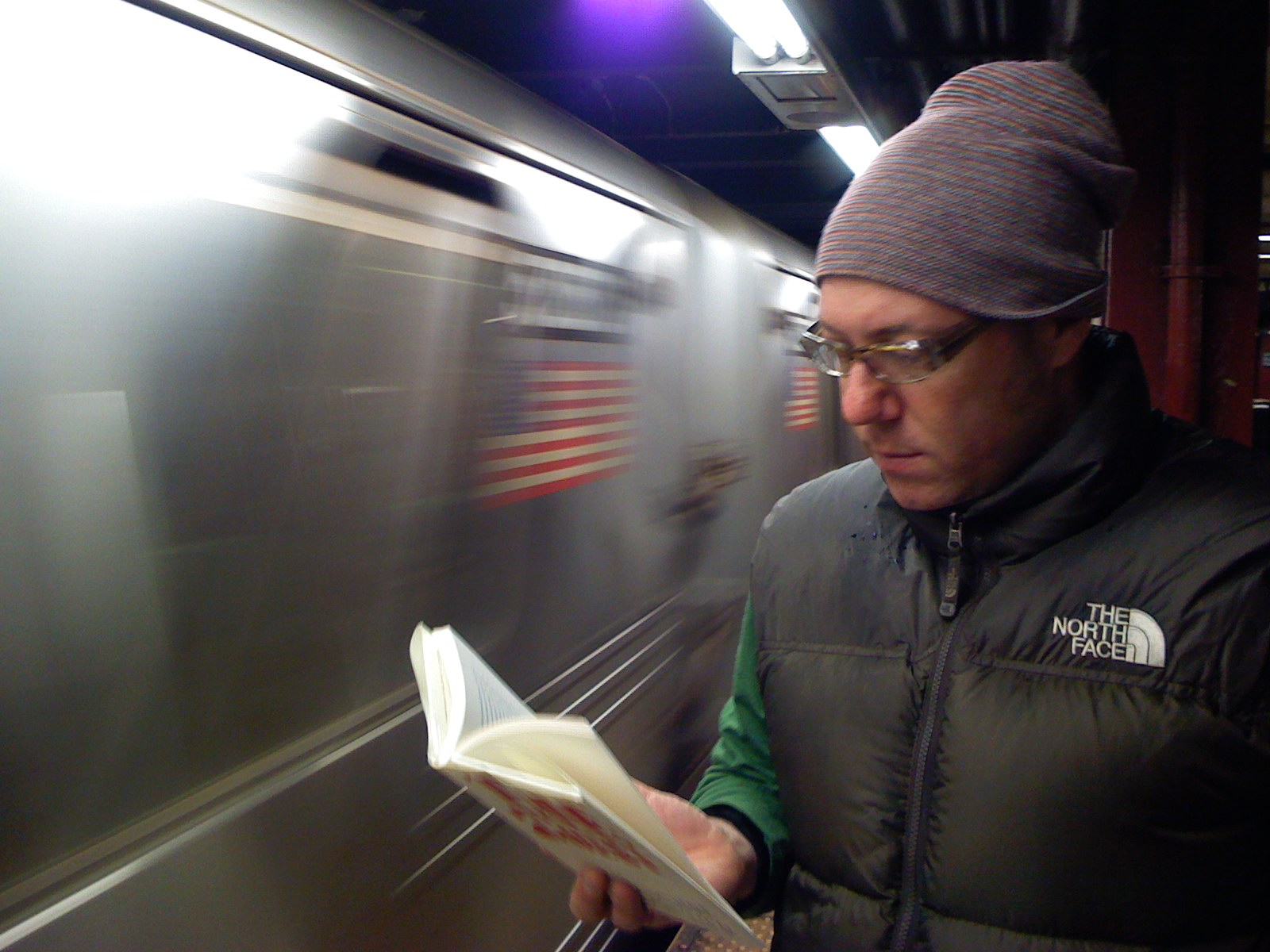 Adam Levy